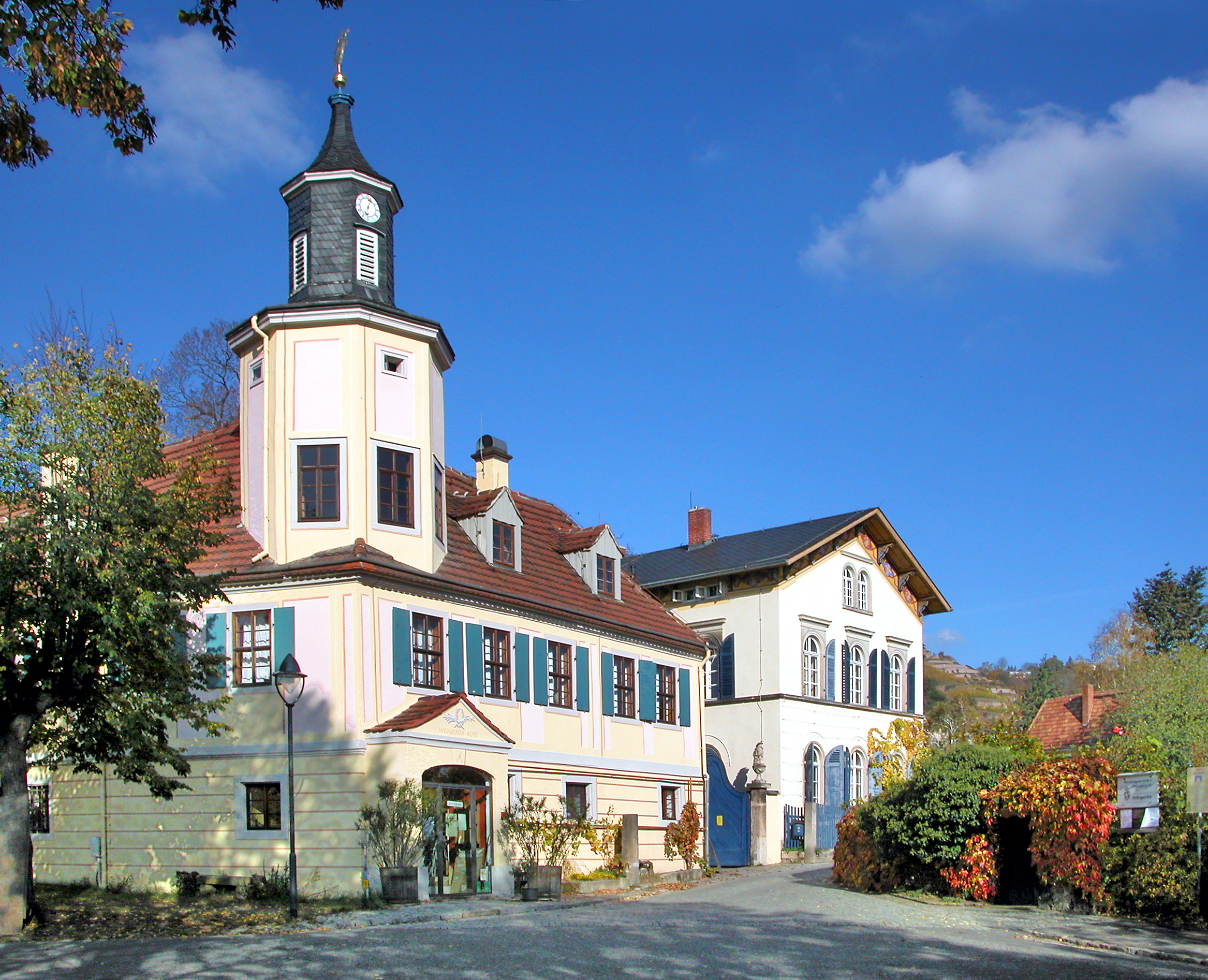 23.10.2008 01445 Radebeul-Oberlößnitz, Weinbergstraße 10: Meinholds Weinberg. Das Turmhaus ist eine um 1750 entstandene, 1792 vom Hofbuchdrucker Carl Christian Meinhold erworbene Zweiflügelanlage. Die zugehörige Landhausvilla wurde um 1850-53 von C. E. Johne für Familie Meinhold errichtet. [DSCN34899.TIF]20081023450DR.JPG(c)Blobelt